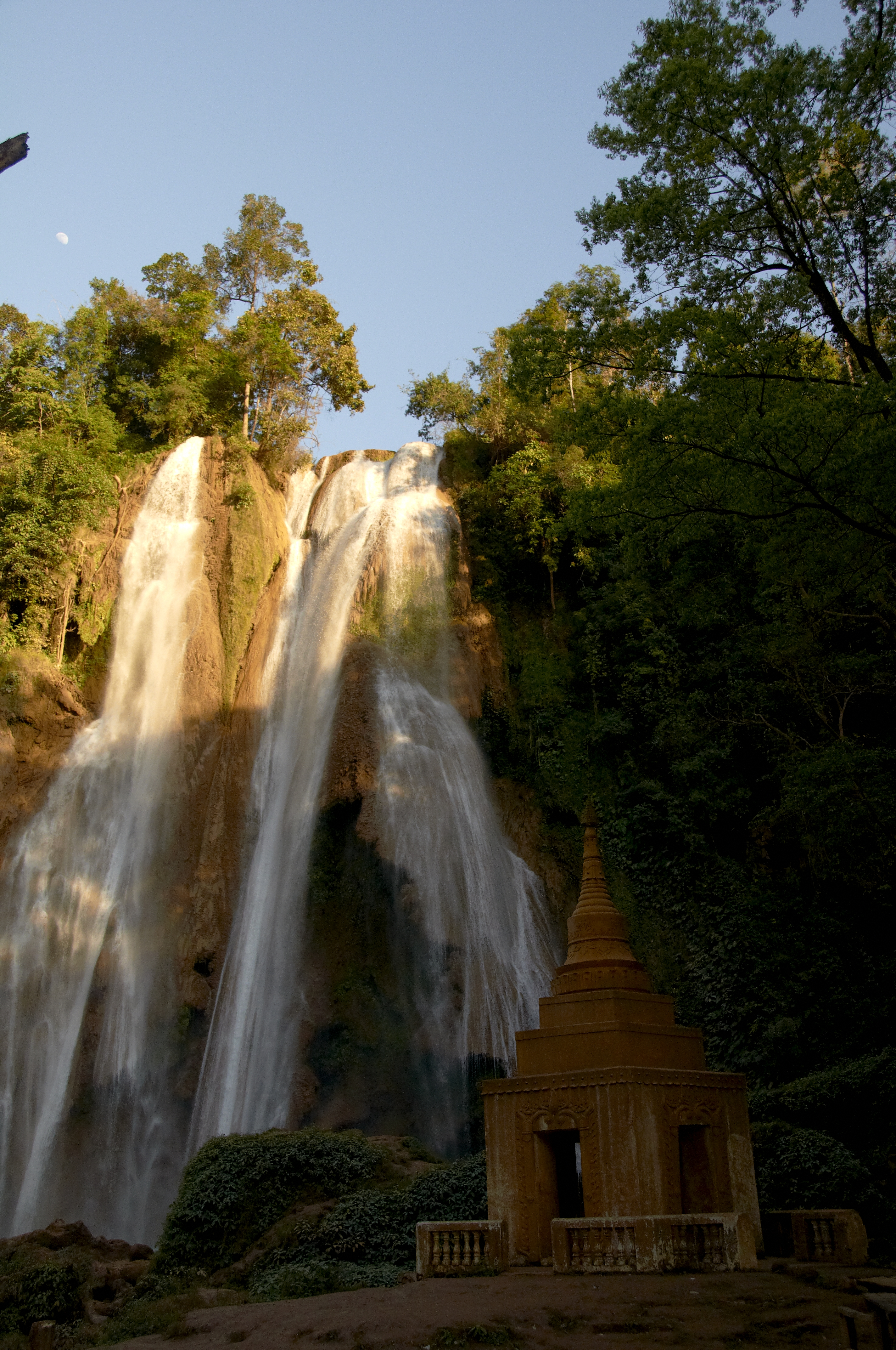 Anesakhan, Myanmar (Burma)